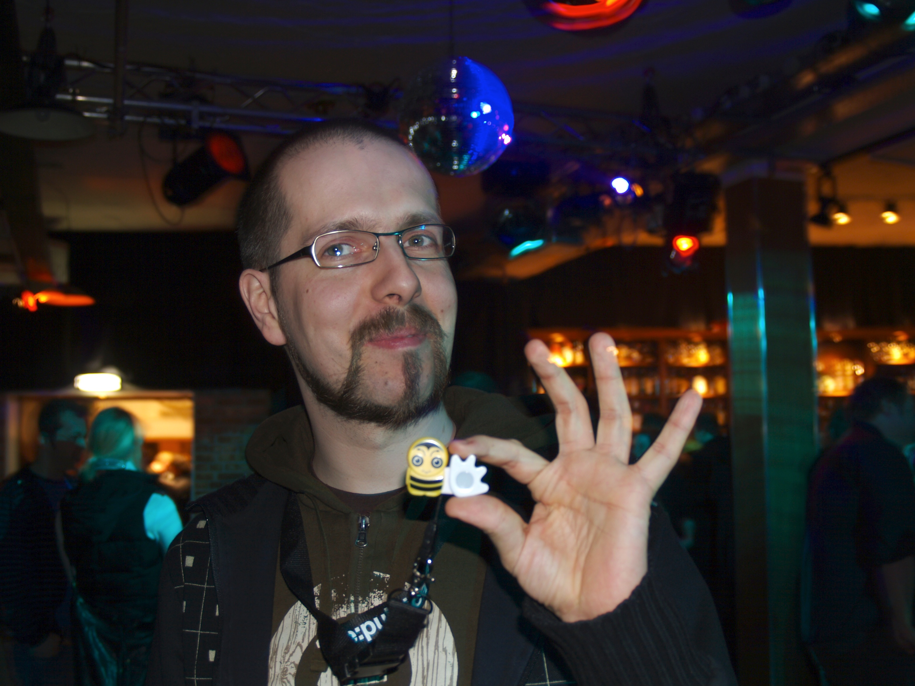 re:publica 09 _21